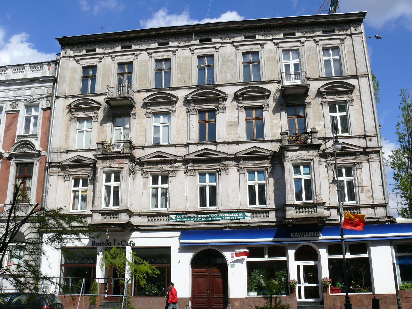 Kamienica Piotrkowska 108 w Łodzi